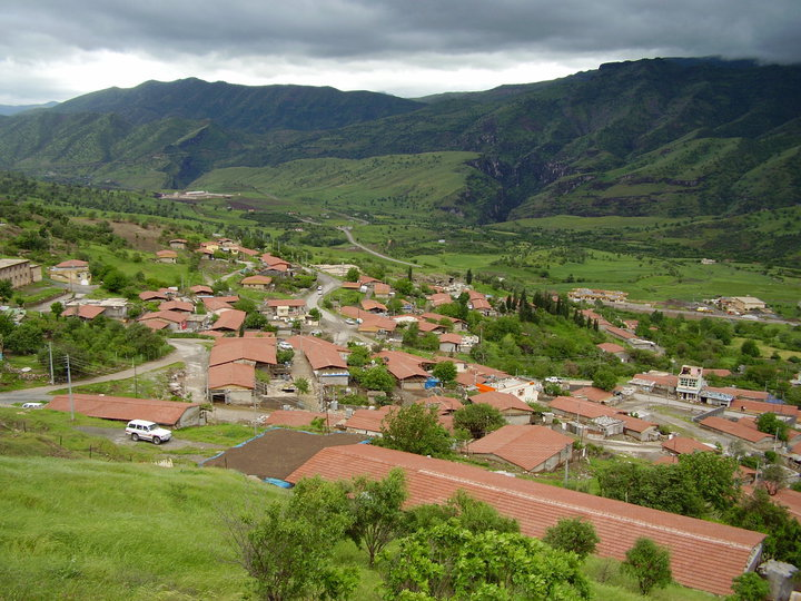 کوردیی ناوەندی: mawat